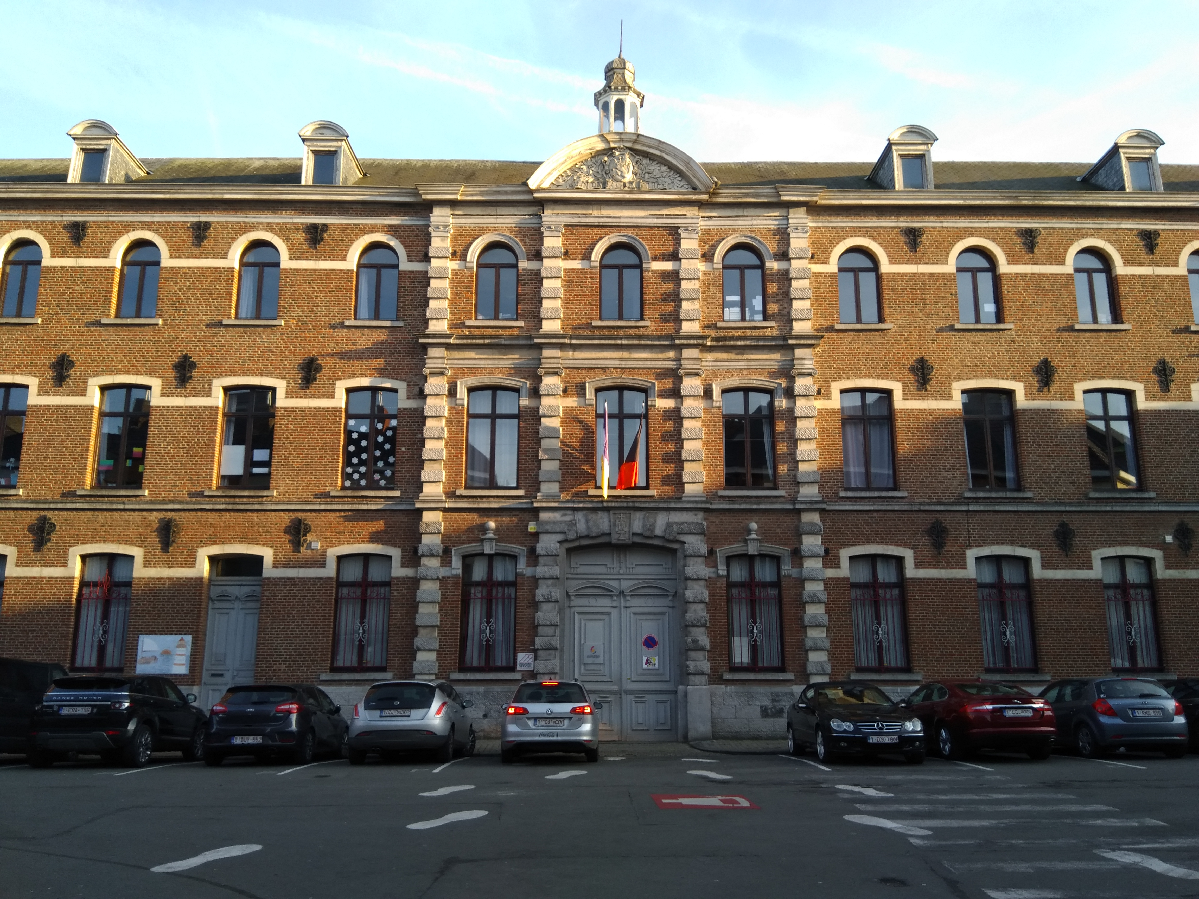 Id est aedificium veterrimum Athenaei Regalis Athi, nunc pars primaria scholae.